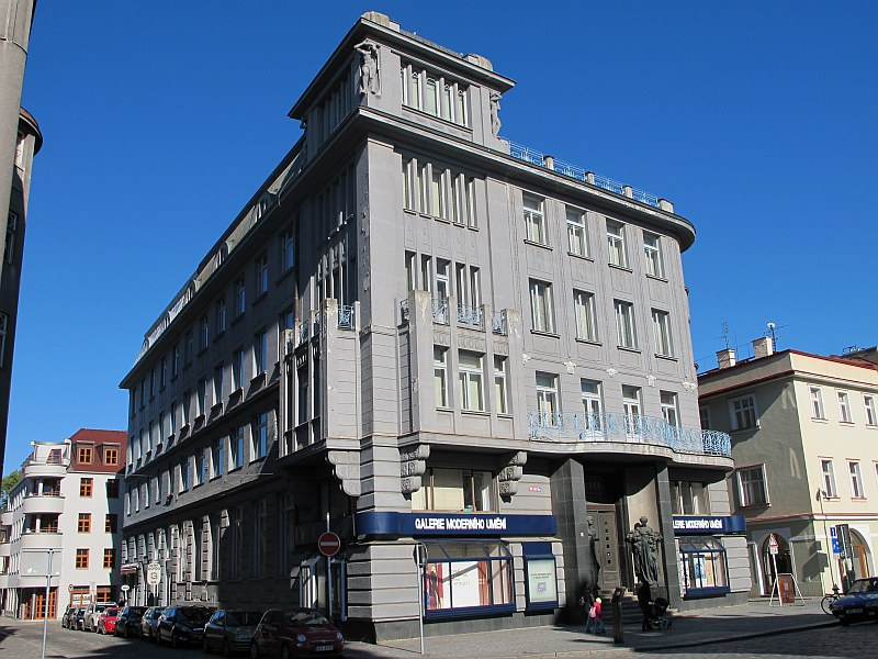 Galerie moderního umění v Hradci Králové, budova byla postavena v roce 1912 Oskarem Polívkou jako Záložna.